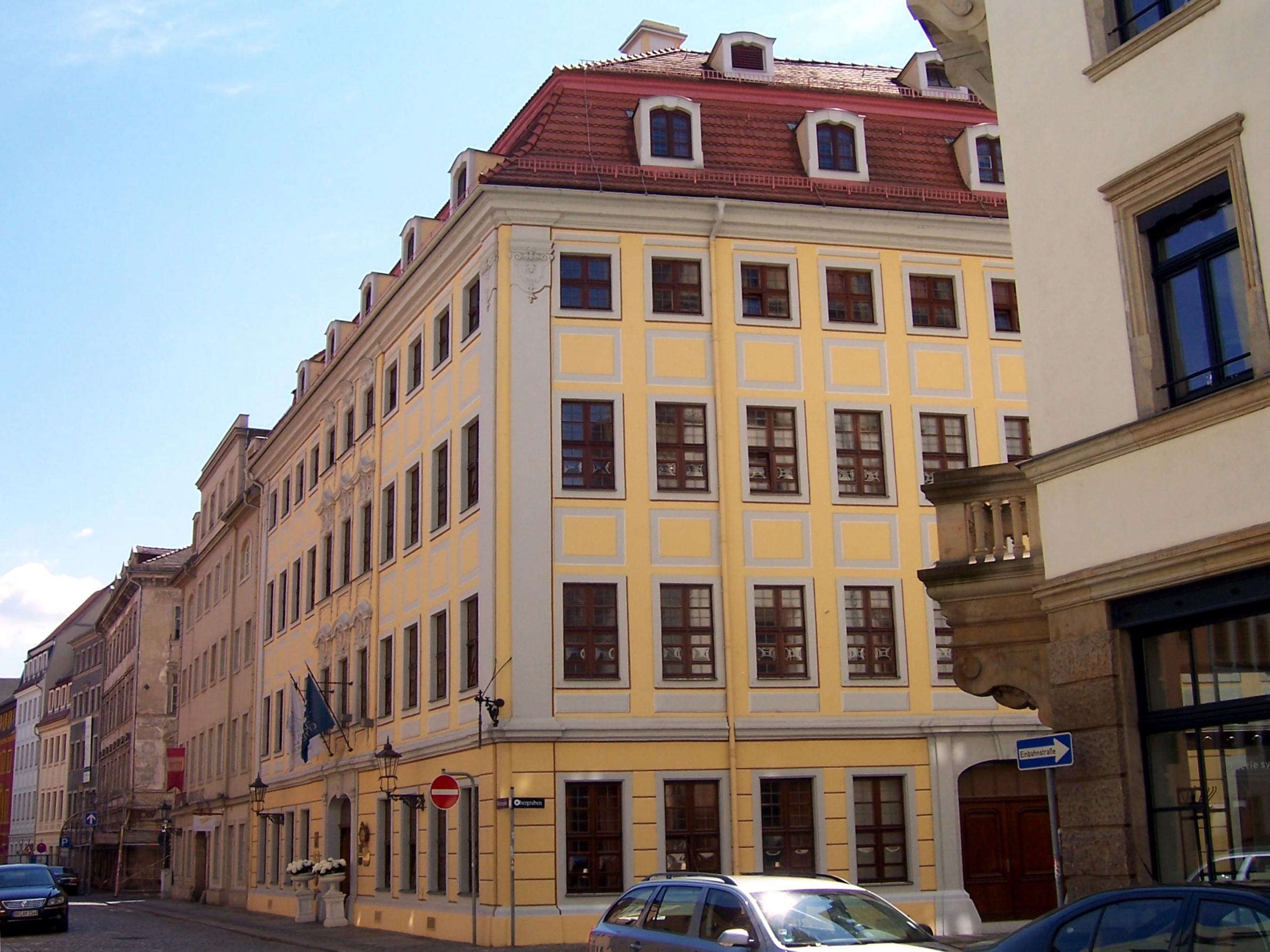 Barockes Haus auf der Rähnitzgasse in Dresden